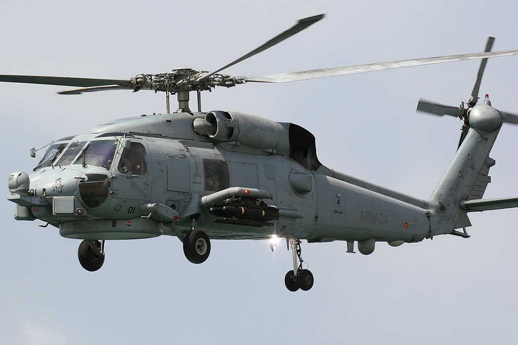 Festival de Cadiz 2012